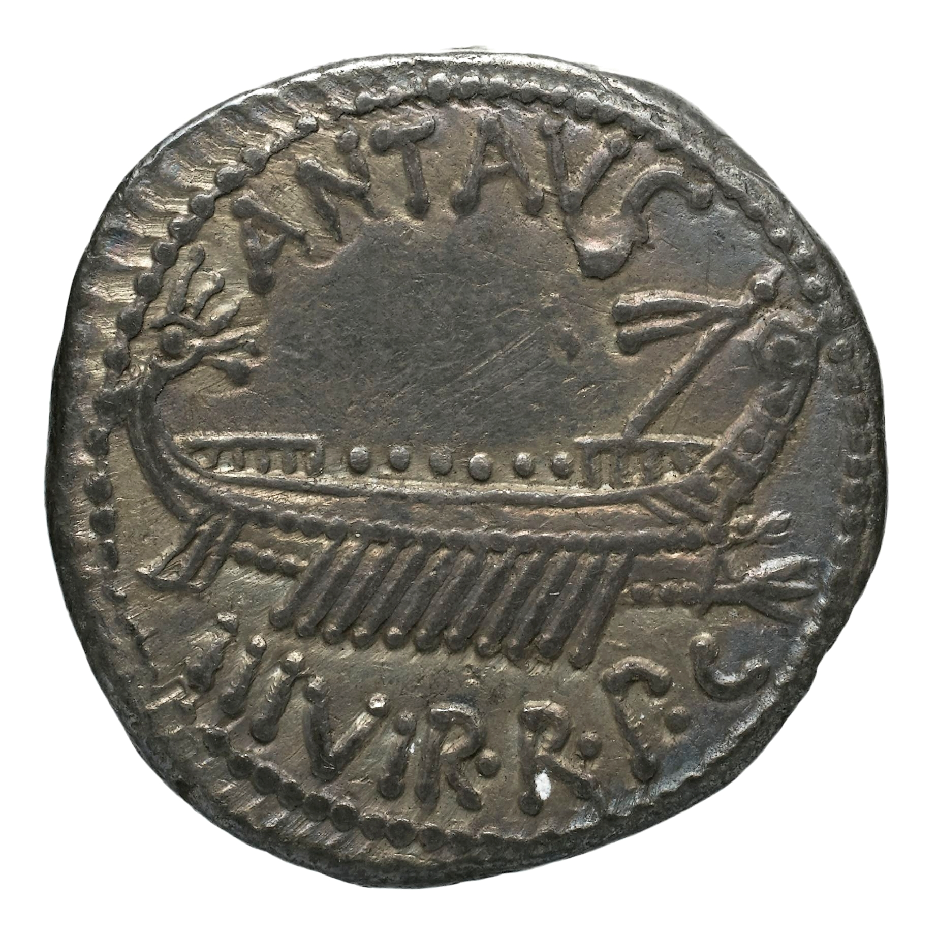 Marc Antoine denier, argent 3,71 gr. Patras, 32-31 av. J.C. Avers : ANT. AVG. III VIR. R. P. C (Antonius Augurus Triumviri Rei Publicæ Constituandæ - Antoine augure triumvir pour la restauration de la République), Trirème voguant à droite avec l’acrostolium. Collection BnF REP-20990